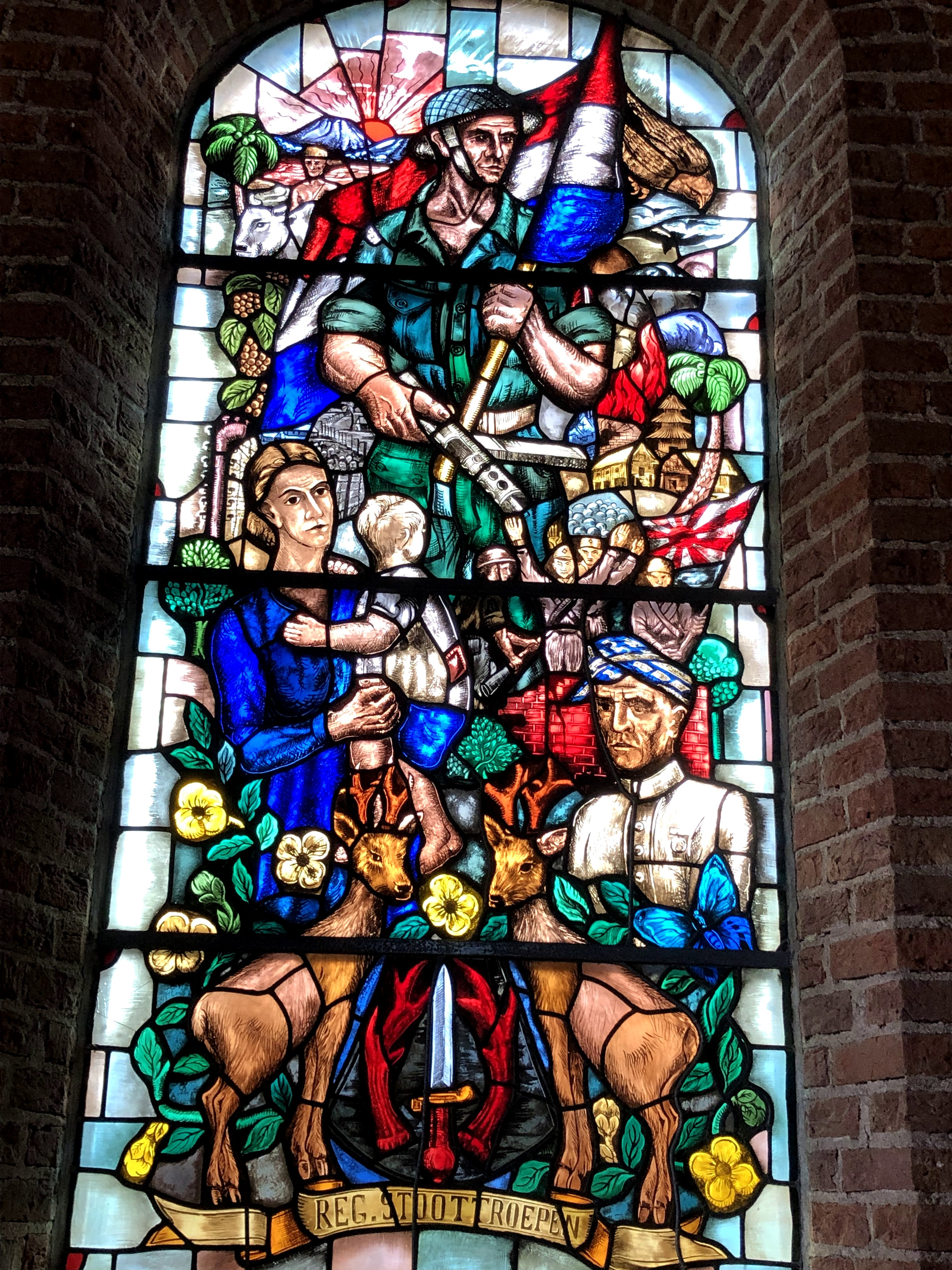 Op dit raam is een Nederlandse soldaat zichtbaar die onder andere boven een groep Japanse soldaten en een moeder en kind uittorent. Aan de onderkant van het raam is er plek voor het wapen van het Regiment Stoottroepen.